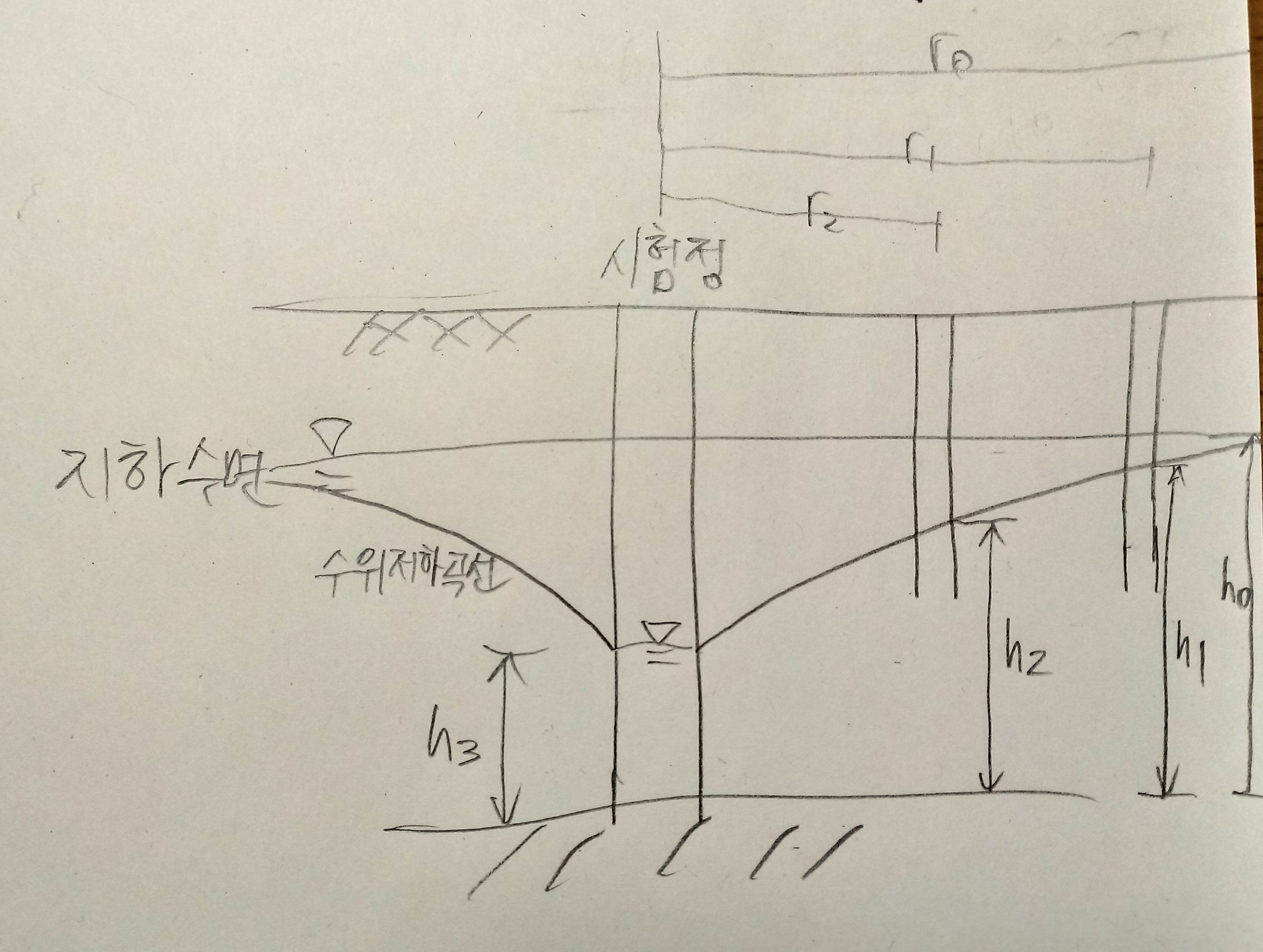 양수시험 그림